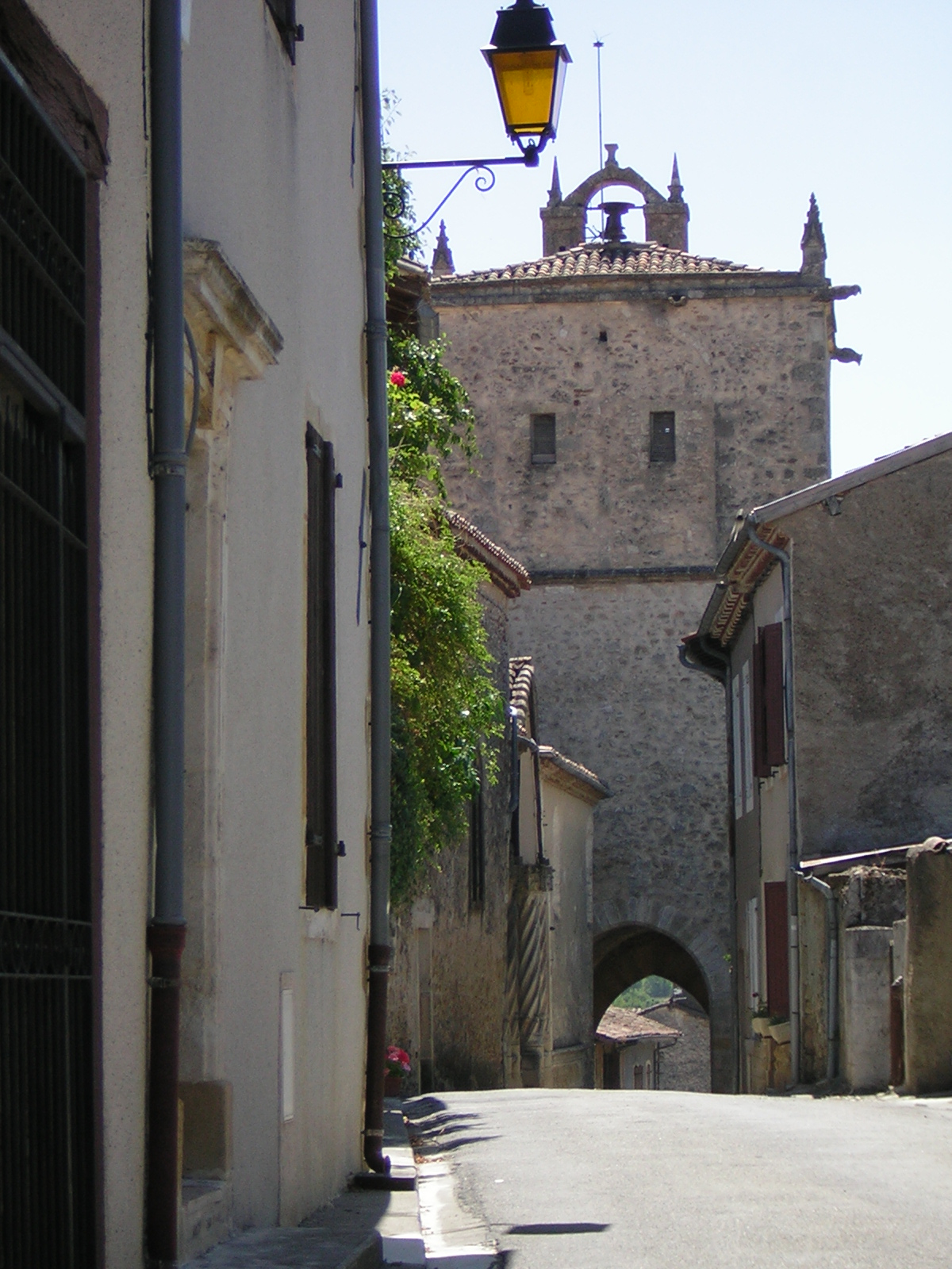 Aurignac: torre fortificada de la iglesia